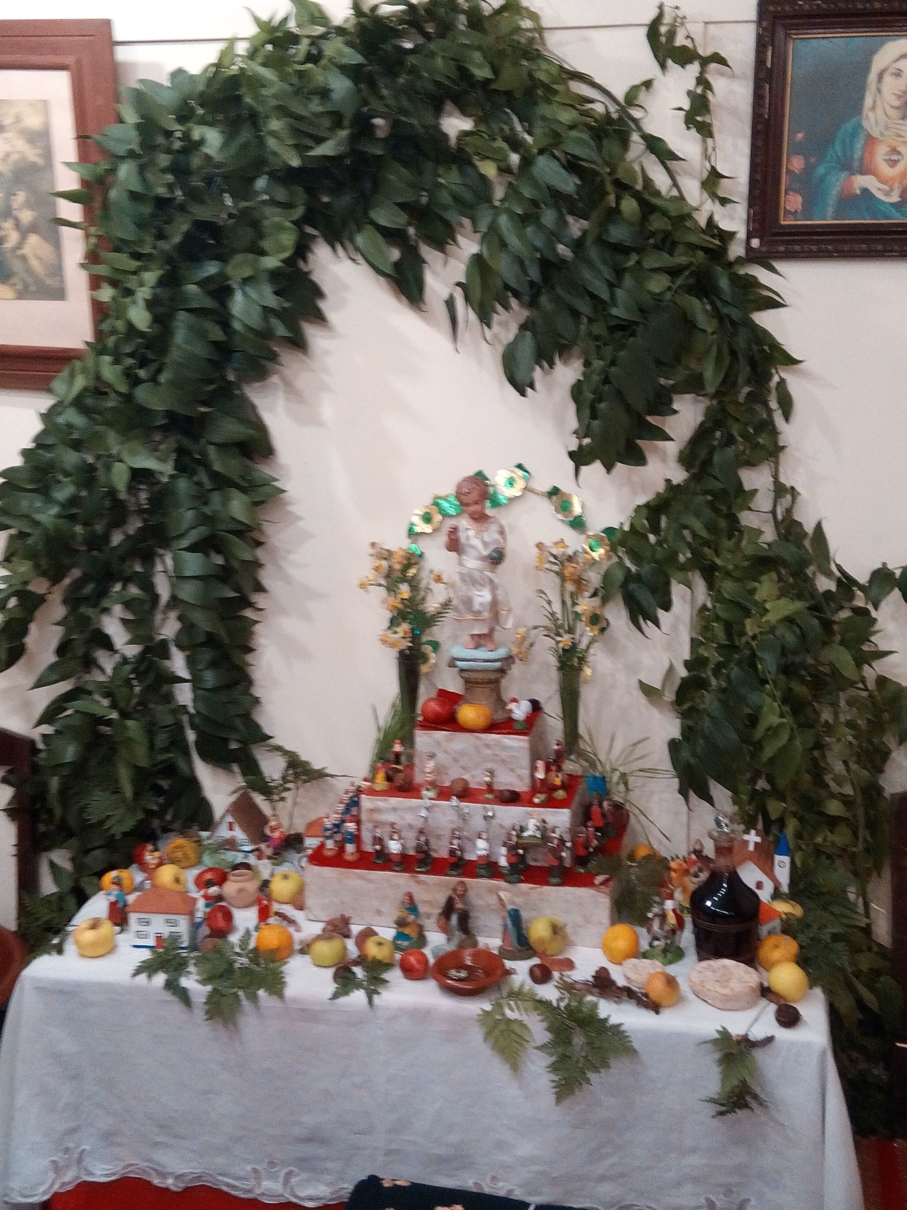 Presépio de lapinha em escadinha, no Largo da Restauração no Funchal. Parte das decorações natalícias da cidade.